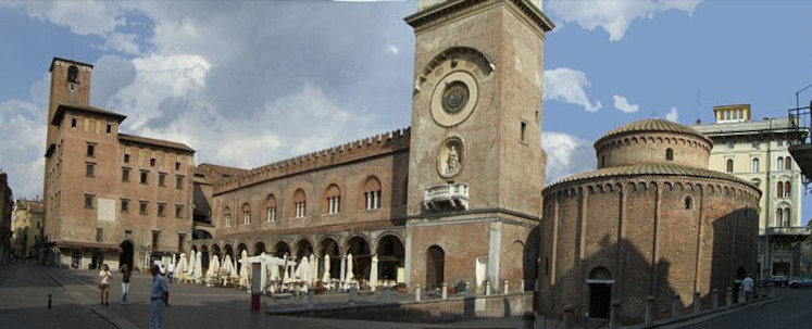 Il Palazzo della Ragione a Mantova. Autore:Giovanni Bufalo, Consulenza grafica:Pietro Mudu